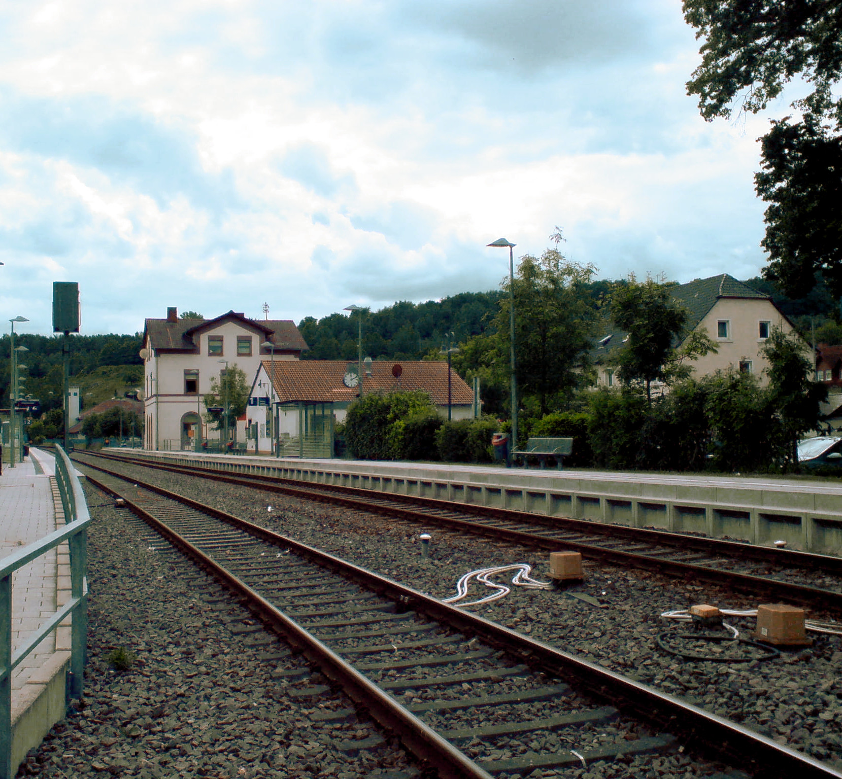 Bahnhof Glan-Münchweiler Gesamtansicht crop